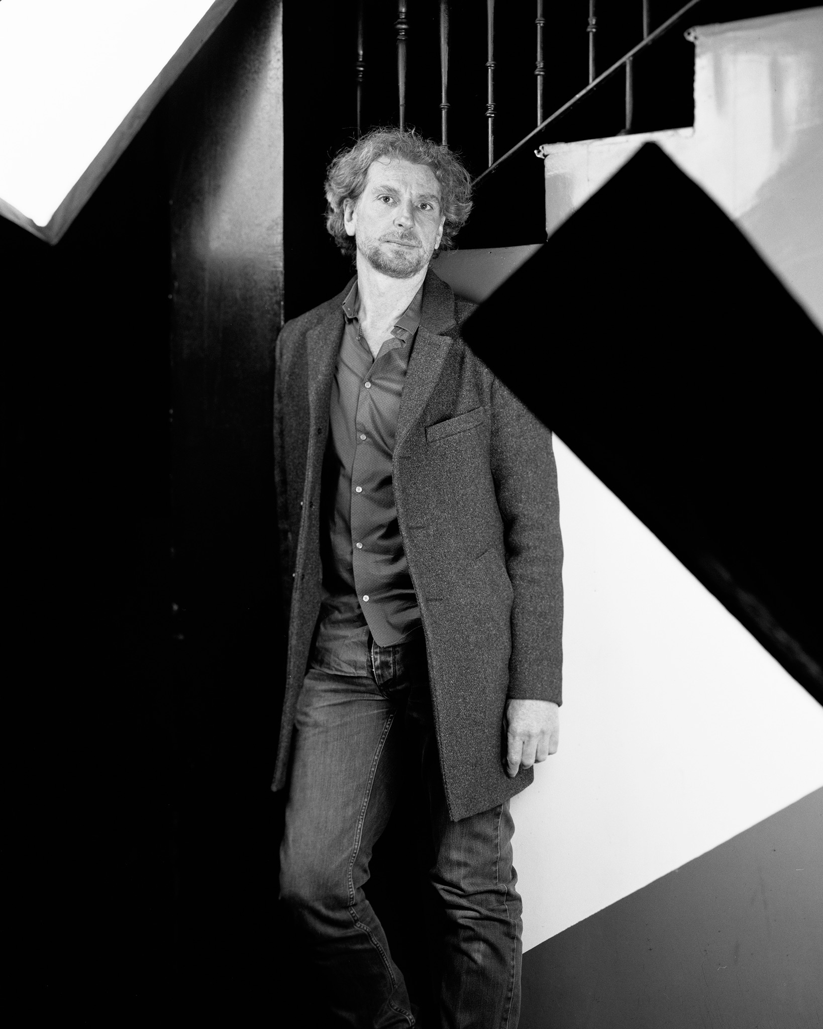 PORTRAIT